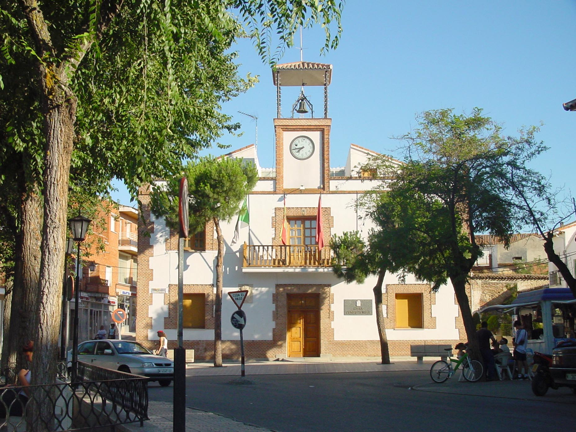 Ayuntamiento de El Álamo.